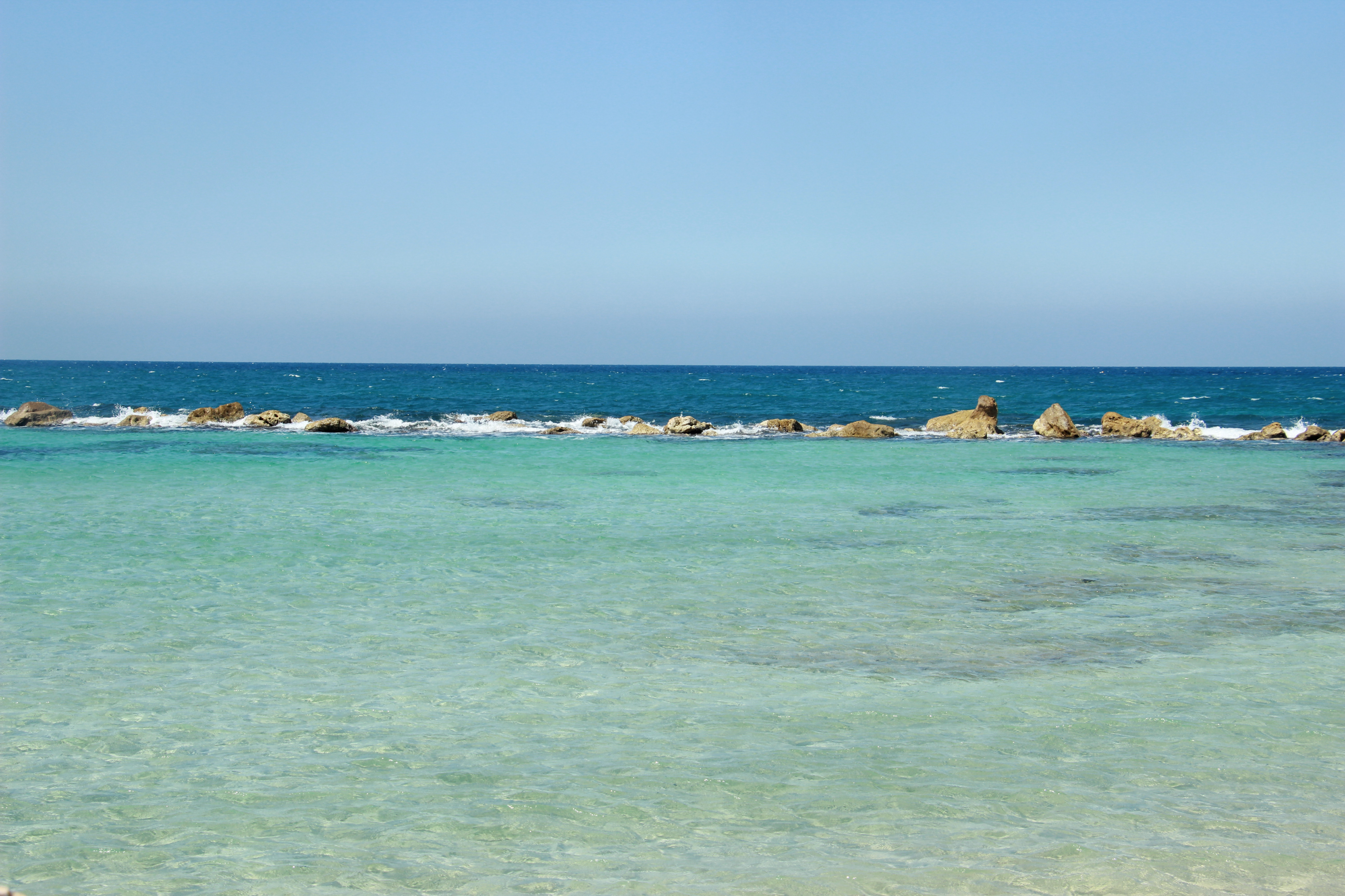 ים באכזיב